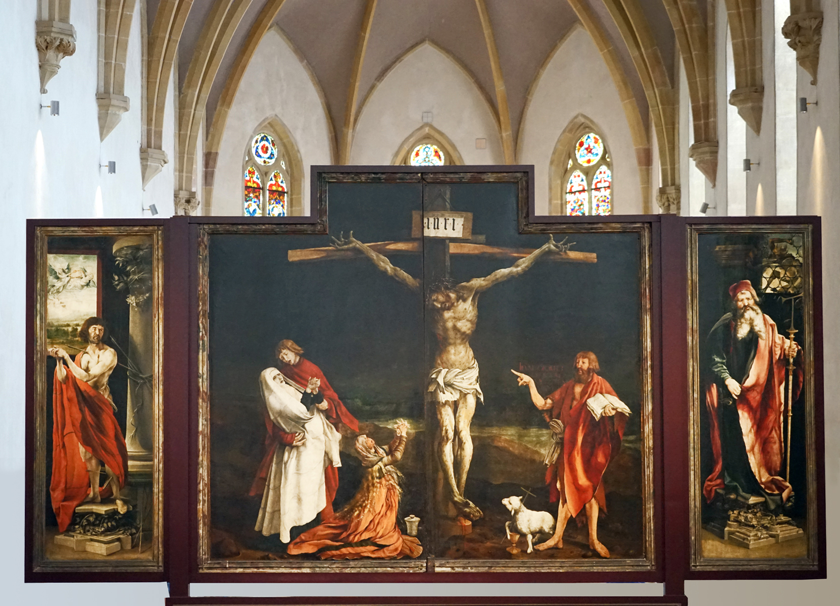 Mathis Gothart Nithart, dit Grünewald, Retable d’Issenheim, position fermée (partie haute), entre 1512–1516 Le retable fermé offre une vision terrifiante de la Crucifixion emplie de douleur, encadrée des panneaux des deux saints invoqués contre les épidémies: saint Antoine (à droite) et saint Sébastien (à gauche) , prié contre la peste. (extrait du site officiel) Site du musée Unterlinden (Colmar)